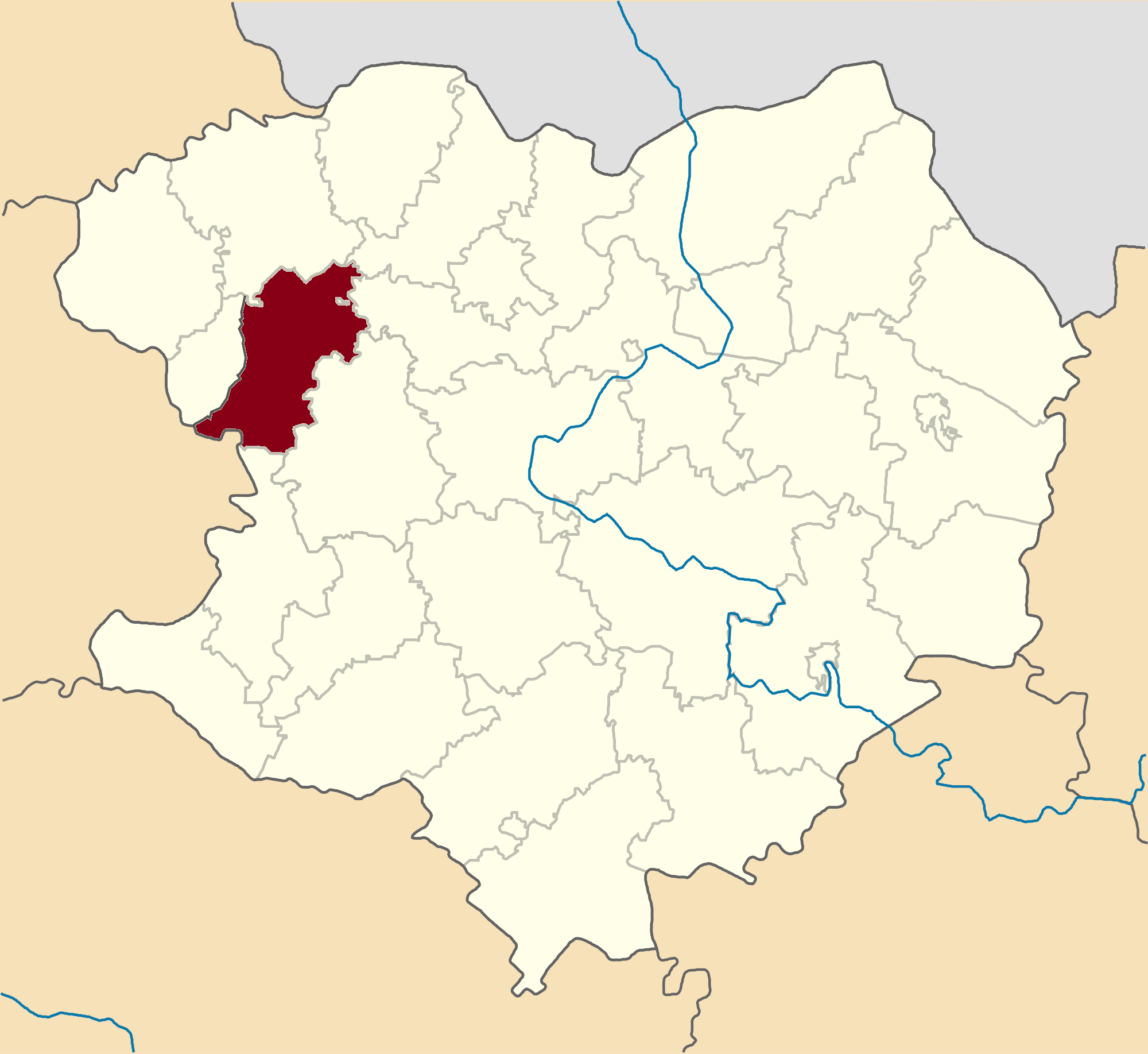 Valkivskyi-Raion map